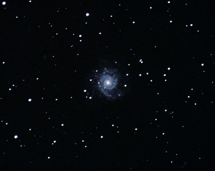 exposure: 1 h 30 ' lunette ED 114/600 canon eos 400d a 800iso